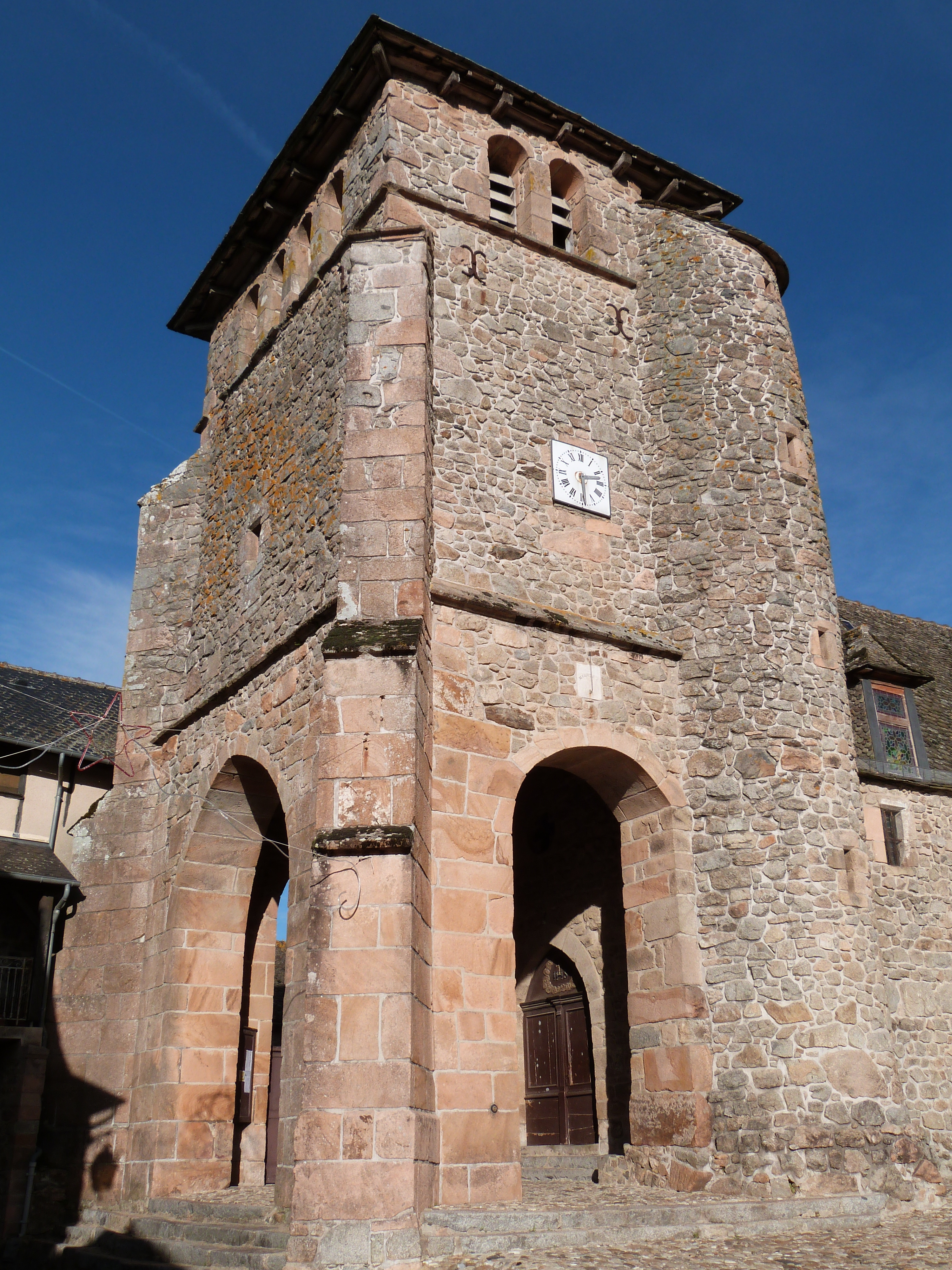 Ce clocher-porche est celui de l'église Saint Jean-Baptiste de La Bastide-l'Évêque (construite à partir de 1280)